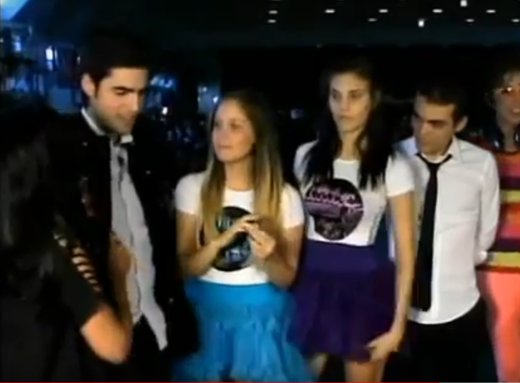 EME 15 en una entrevista en un concierto